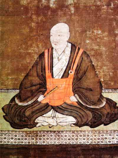 戦国大名、大友宗麟の肖像画